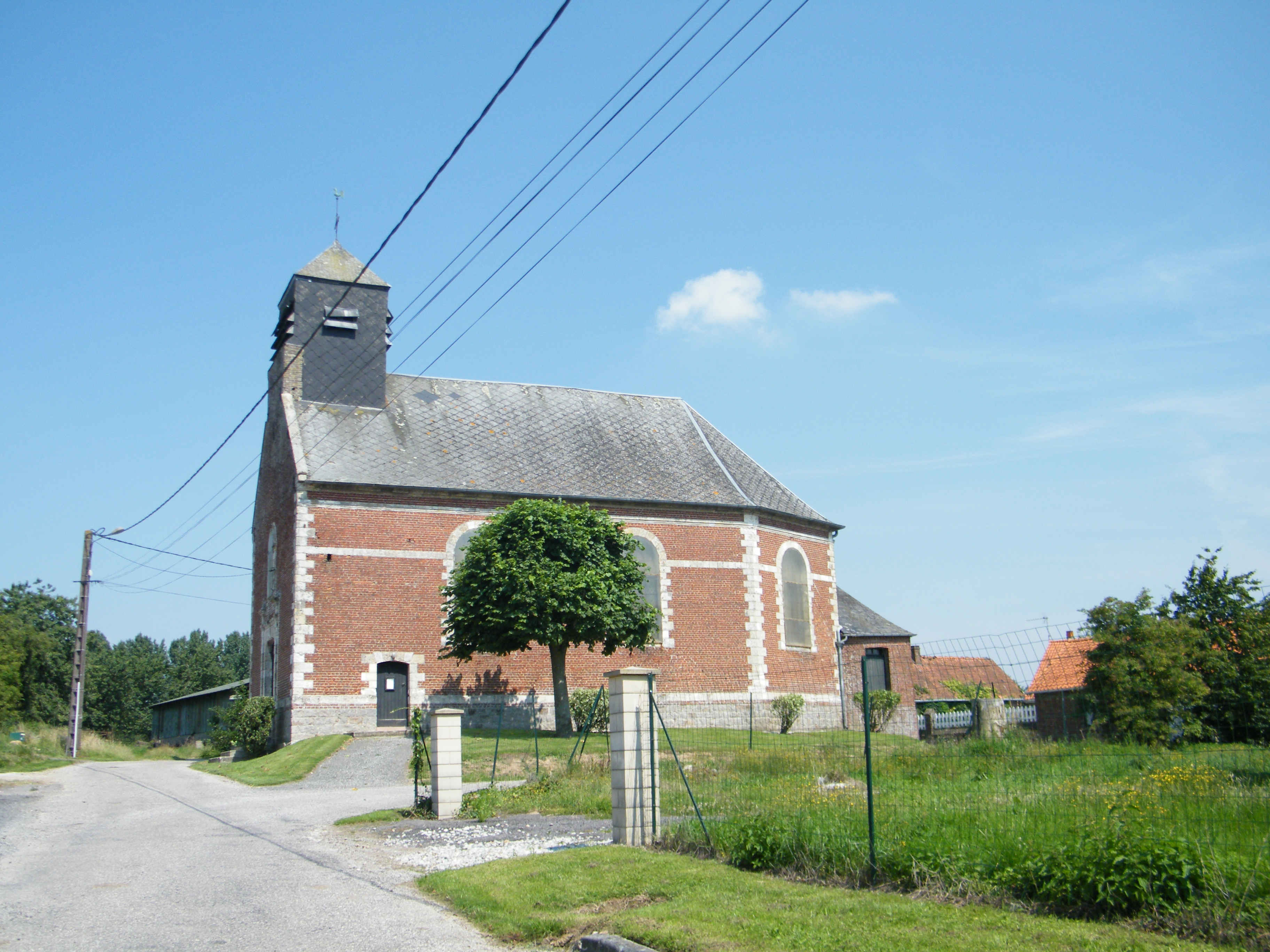 Église de Courcelles-au-Bois, Somme, France.